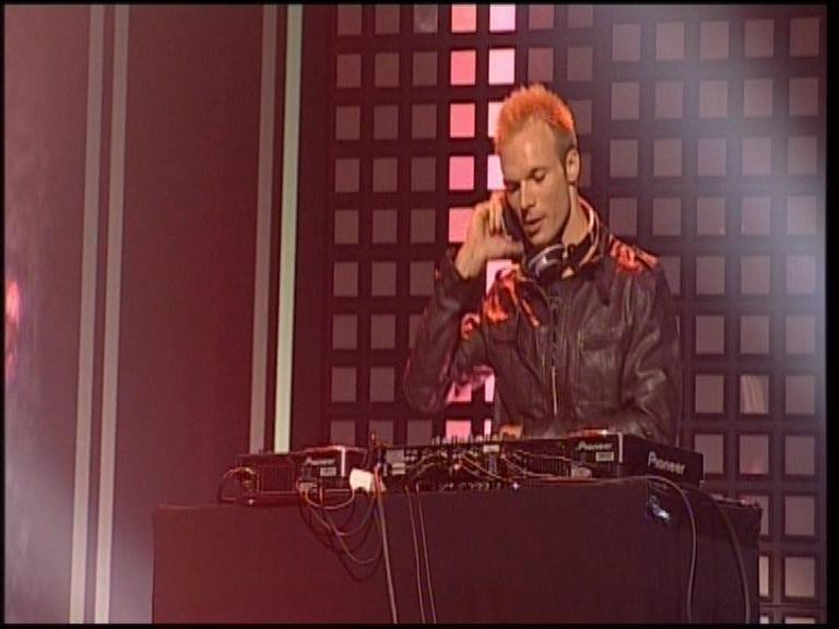 Mac Demetrius Glamour Is Back Tour Elite Model Look 2010